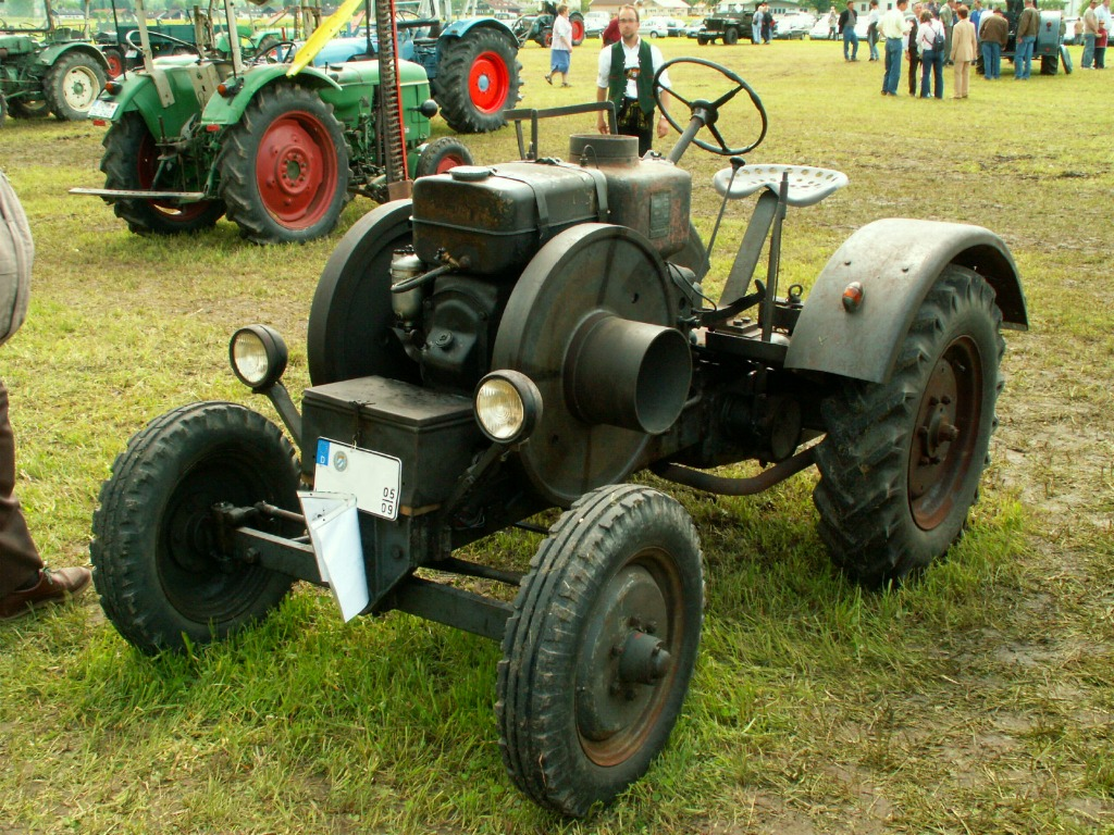 Fendt Dieselross F18 mit 16 PS, Baujahr 1942, Hubraum: 1797 ccm, Eigengewicht: 1500 kg, zul. Gesamtgewicht: 1800 kg, vorderer Achsdruck: 588 kg, hinterer Achsdruck: 1212 kg